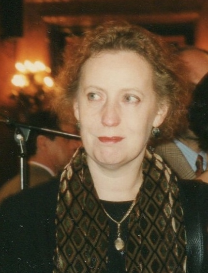 Porträt Christina Weiss, ehemalige Kultursenatorin Hamburg und Beauftragte der Bundesregierung für Kultur und Medien.